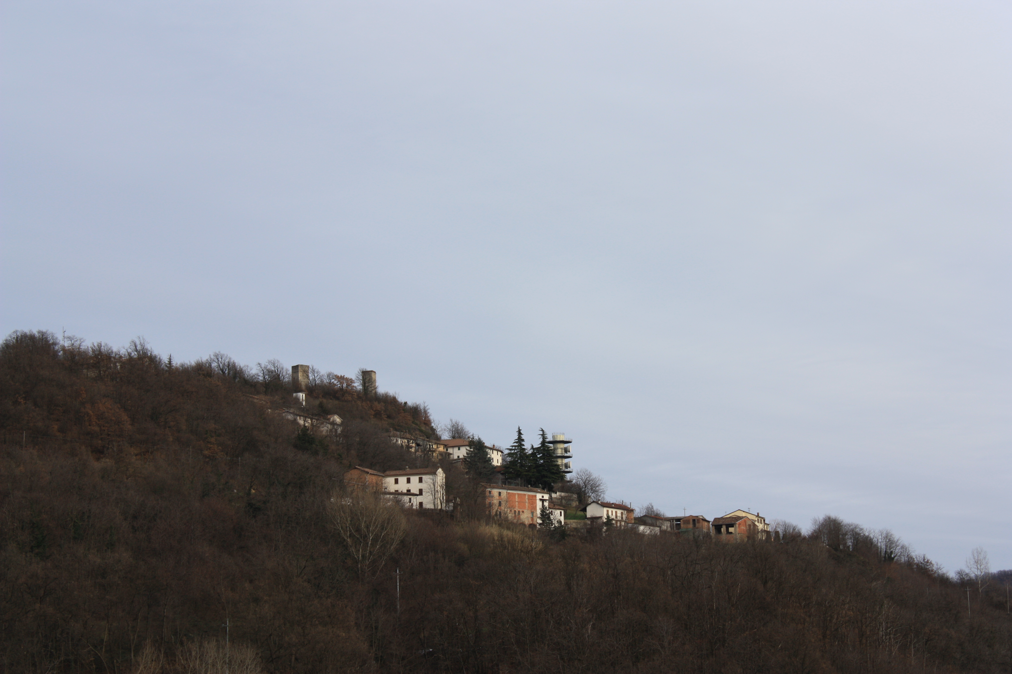 La frazione Sant'Alosio (20 ab.) di Castellania (AL) a 509 mt d'altezza.